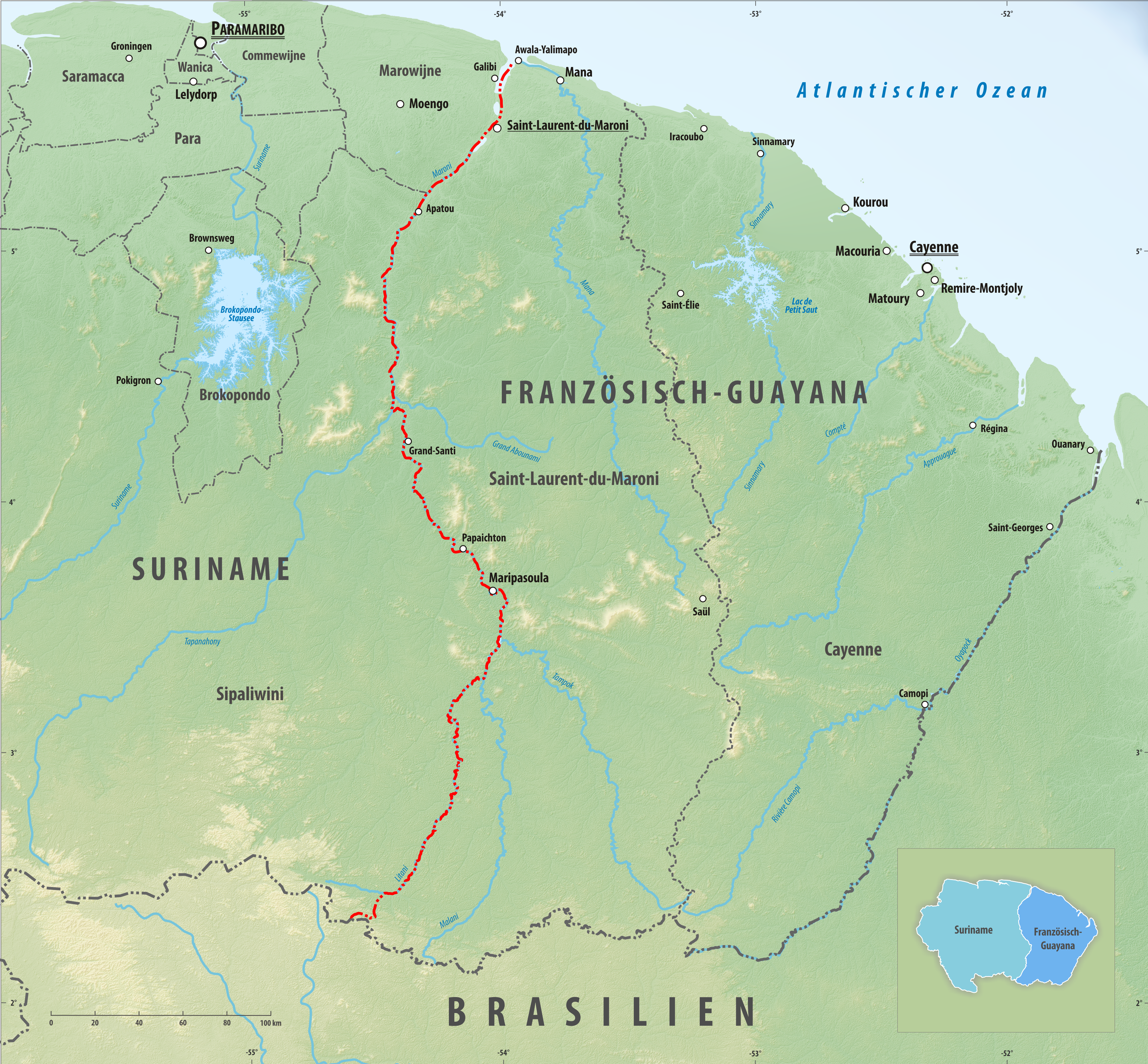 Reliefkarte des Grenzverlaufes zwischen Frankreich (Französisch-Guayana) und Suriname Topographischer Hintergrund: NASA Shuttle Radar Topography Mission (public domain). SRTM3 v.2.